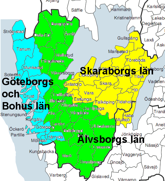 gamla länen som idag är västra götalands län